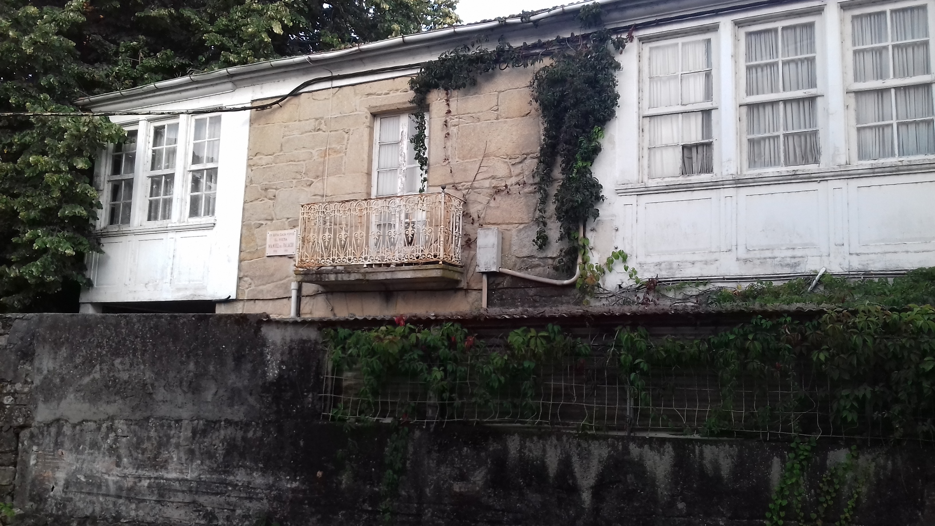 Casa na que viviu o poeta Manuel del Palacio en Pontevedra, na rúa Ramon Peña